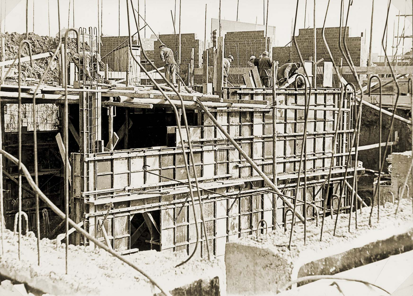 Einer der ersten Einsätze der NOE Universal-Stahlschalung: Bau der Weststadt-Schule, Göppingen. Diese patentierte Schalung gilt als eine der ersten Rahmenschalungen.